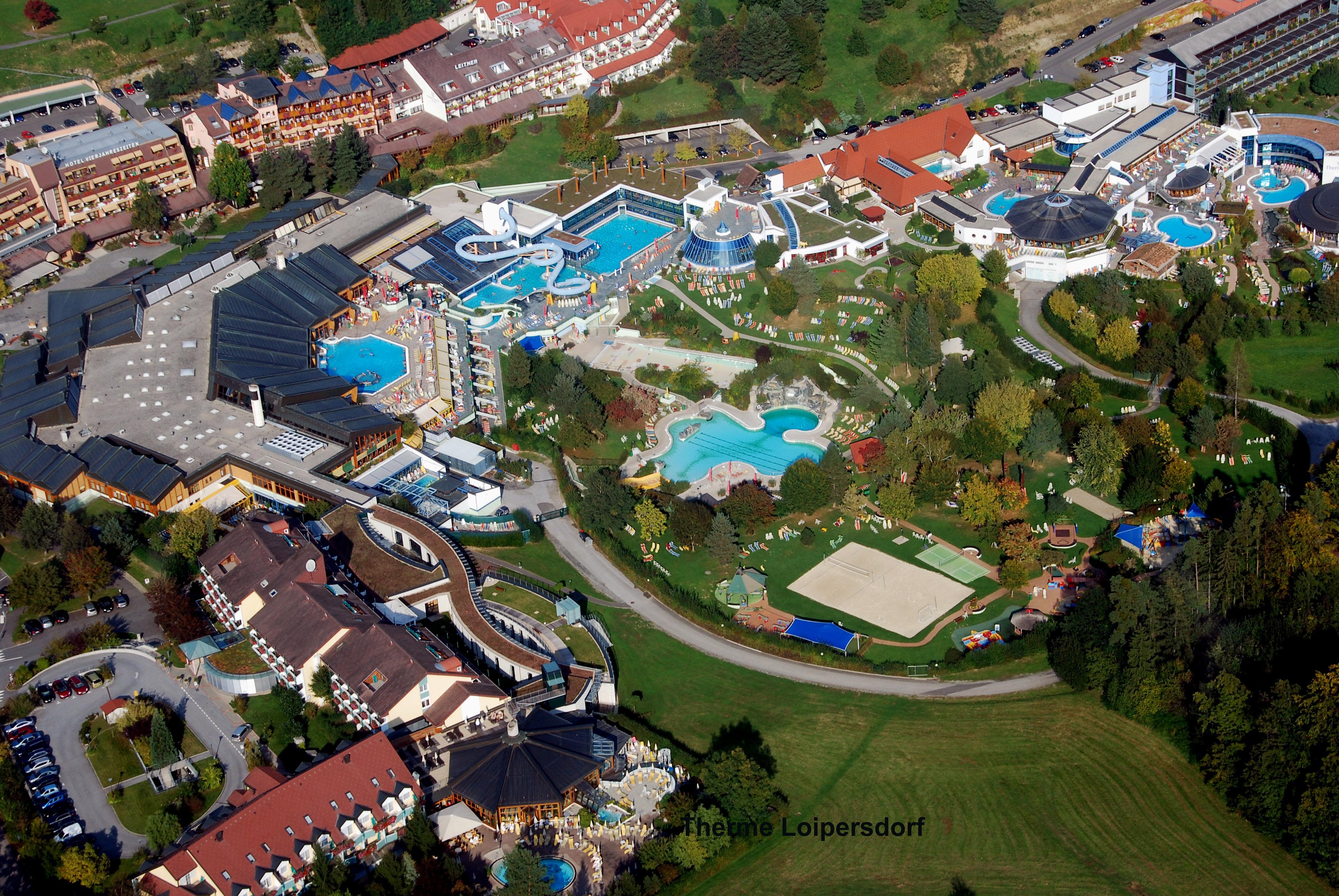 Thermalbad Loipersorf, Oststeiermark